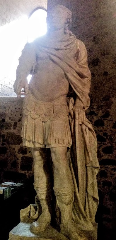 Statua raffigurante Ignazio Paternò Biscari, conservata al Castello ursino